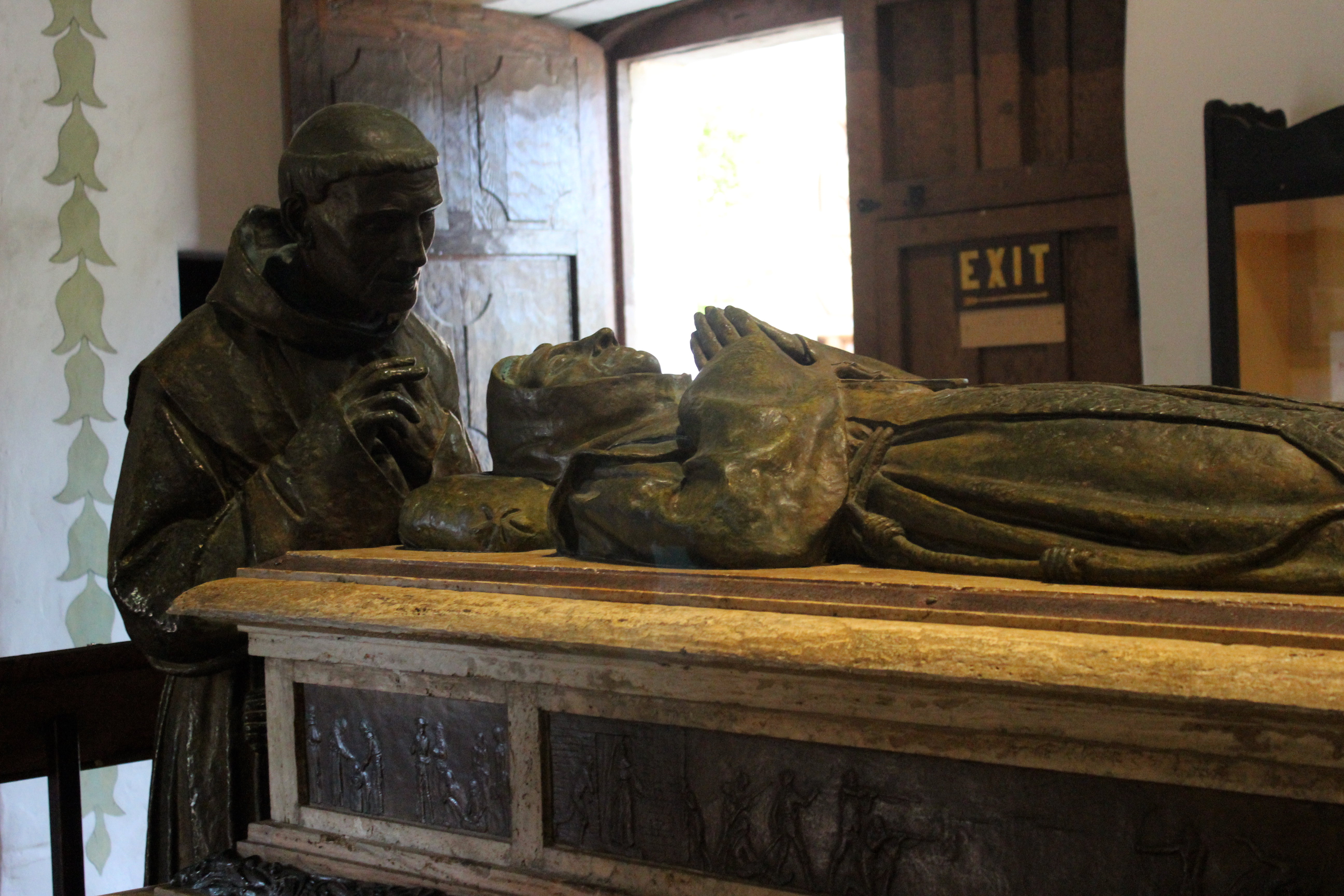 Misión San Carlos Borromeo. Cenotafio de fray Junípero Serra.